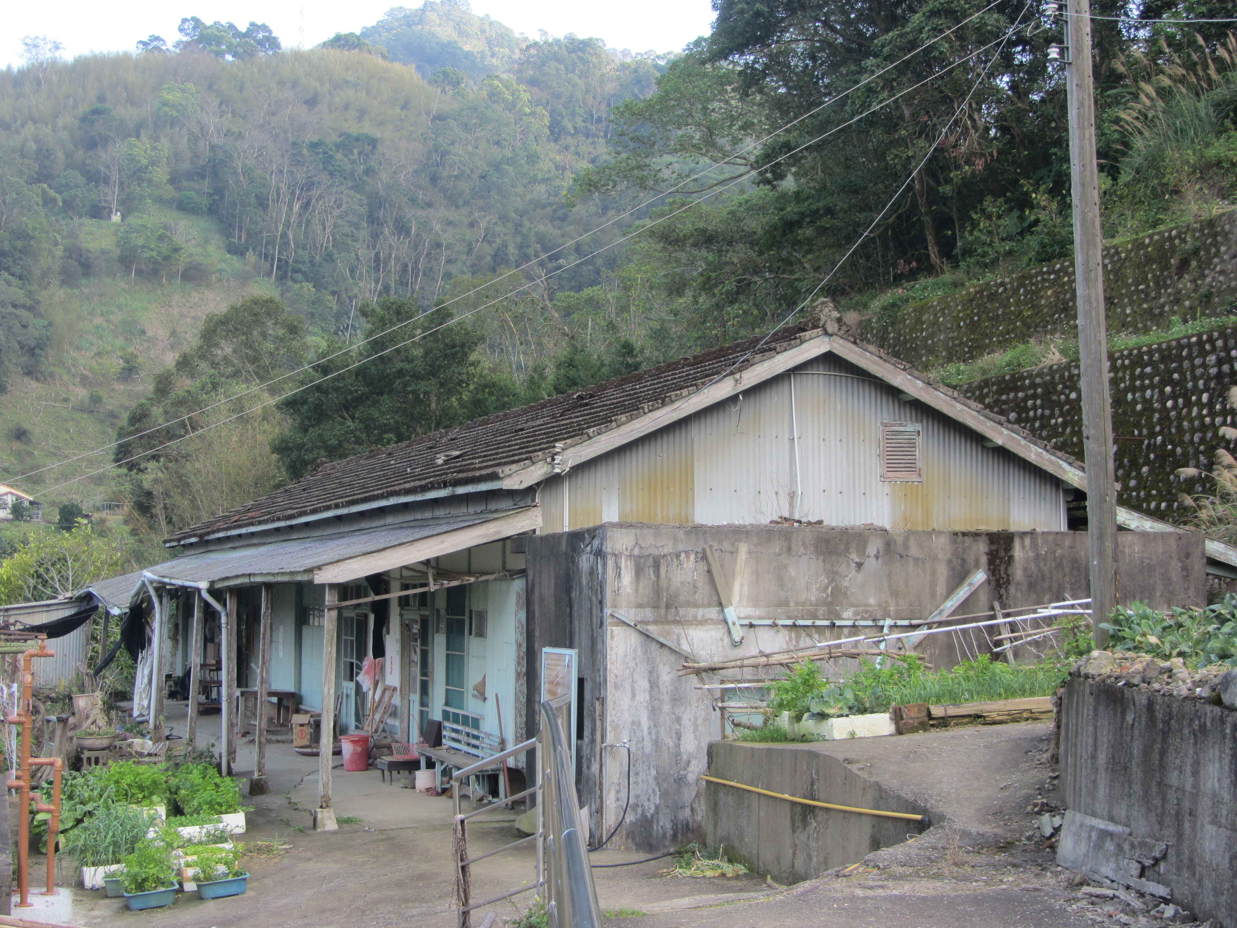 出磺坑8號宿舍